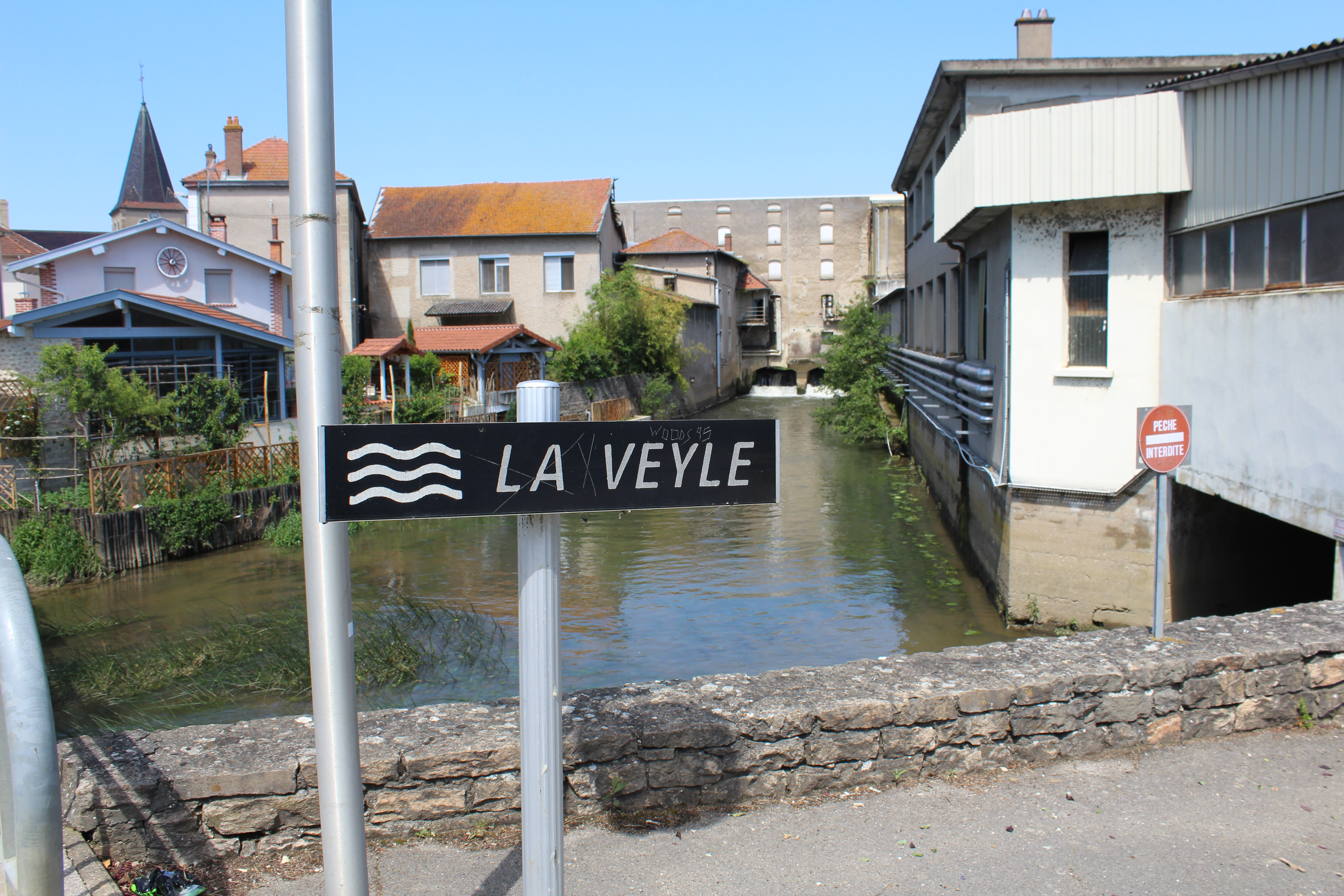 La Veyle à Mézériat près de la route départementale D26. Dans le passage à côté du panneau Pêche interdite se trouve l'Irance, ce qui fait que cet endroit est le confluence entre la Veyle et l'Irance.